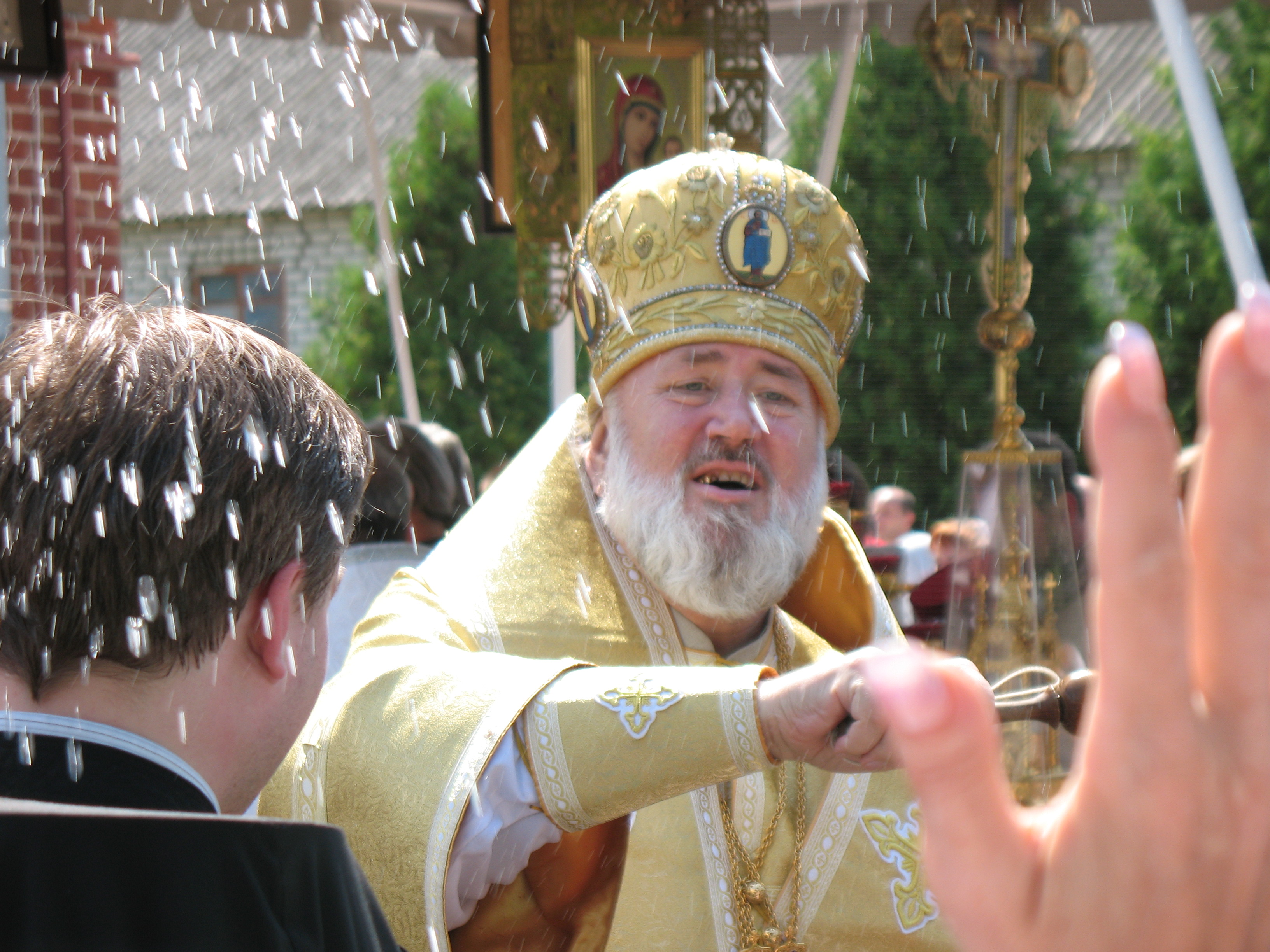 Архиепископ Городницкий Александр (Нестерчук) кропит св. водой на празднике обновления чудотворной иконы Спаса Нерукотворного в Борисоглебском монастыре Изюмской епархии.